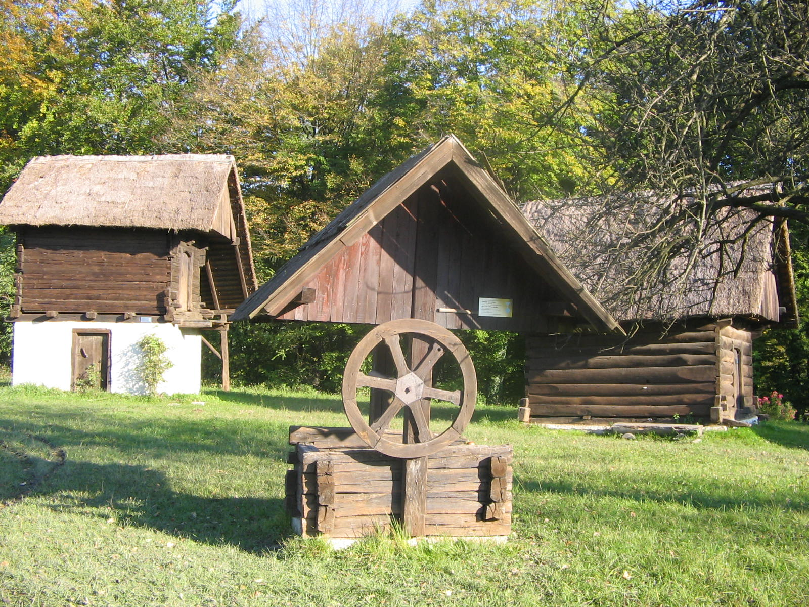 Open air museum Zaprice, Quelle: eigene Aufnahme 18. 10. 2005 Fotograf: Janez Novak, Ljubljana, Slovenija